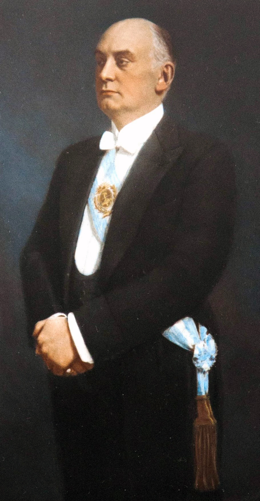 El presidente Marcelo T. de Alvear luciendo la banda presidencial. Marco original.